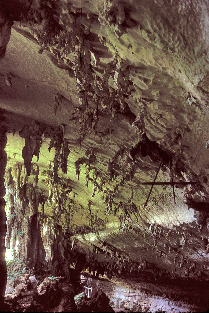 Niah cave, Sarawak, Malaysia